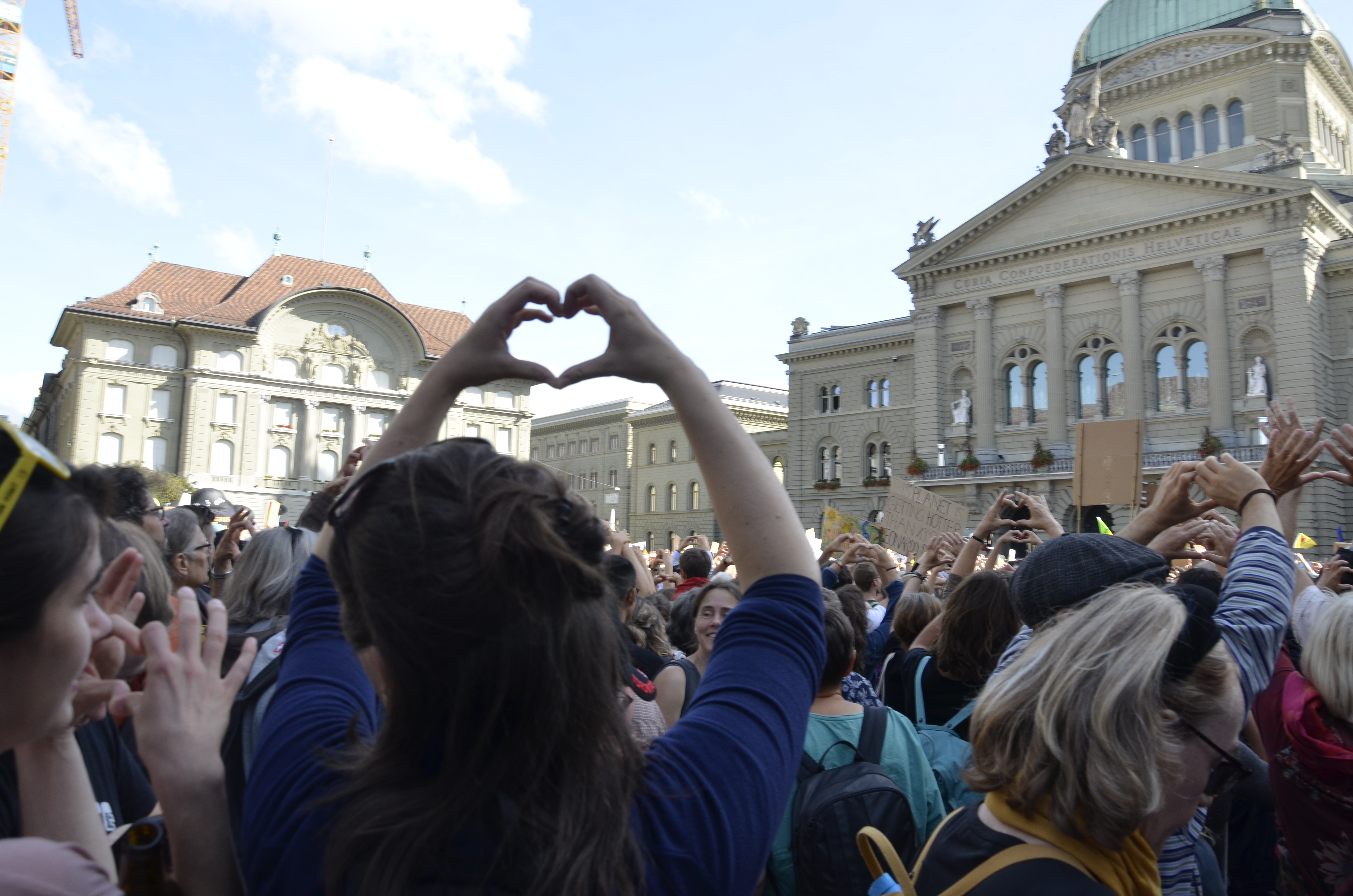 Klimademo Bern: Teilnehmende zeigen mit Händen Herz-Zeichen